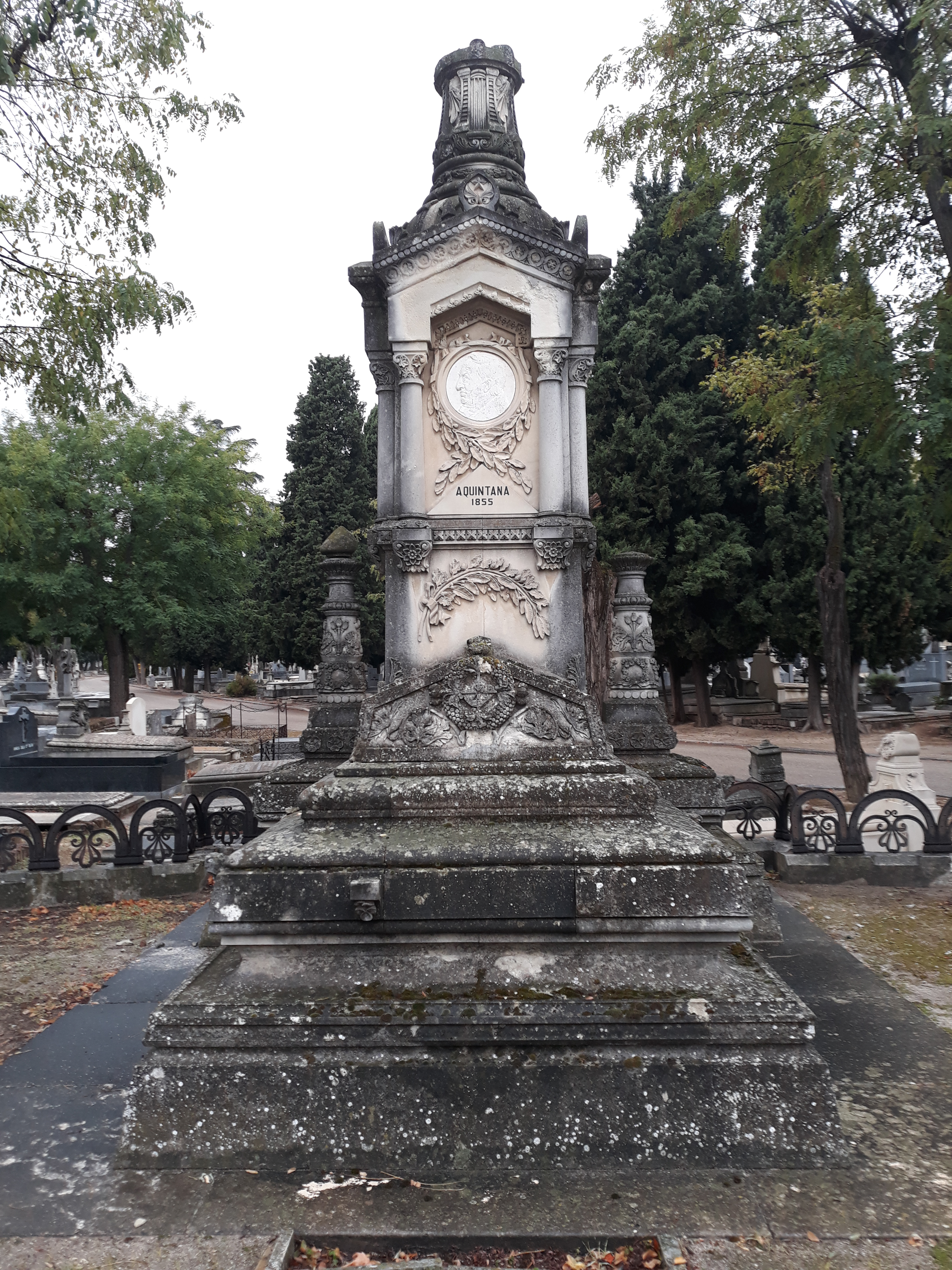 Das Grab des spanischen Schriftstellers Manuel José Quintana auf dem Almudena-Friedhof in Madrid.